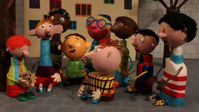 Neuf enfants de 9 à 13 ans, de l'école communale spécialisée Colline de l'éveil ont réalisés sous la coordination et la direction de Louise-Marie Colon et Dominique Van Hecke, le film "L'école du village". Une production Camera-etc. Voir le film